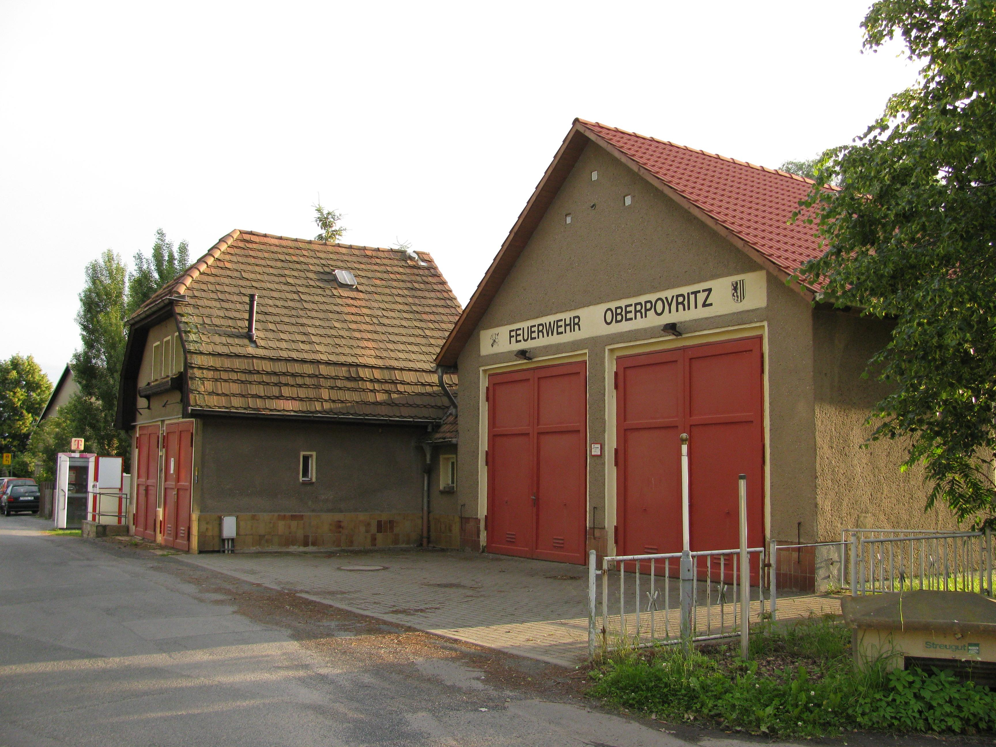 Feuerwehr Oberpoyritz, Dresden